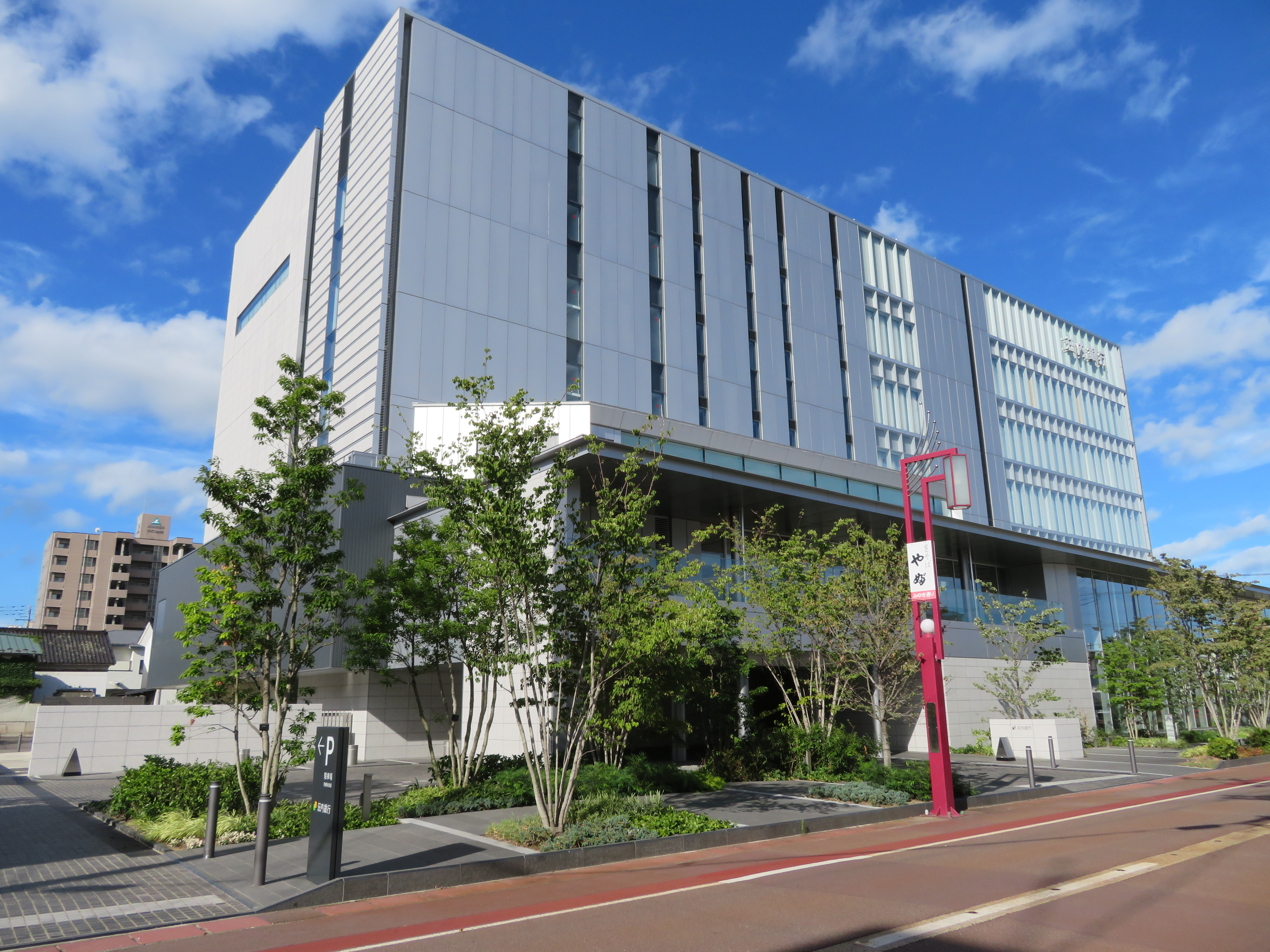 山形県鶴岡市にある荘内銀行本店ビル Canon PowerShot SX720 HS